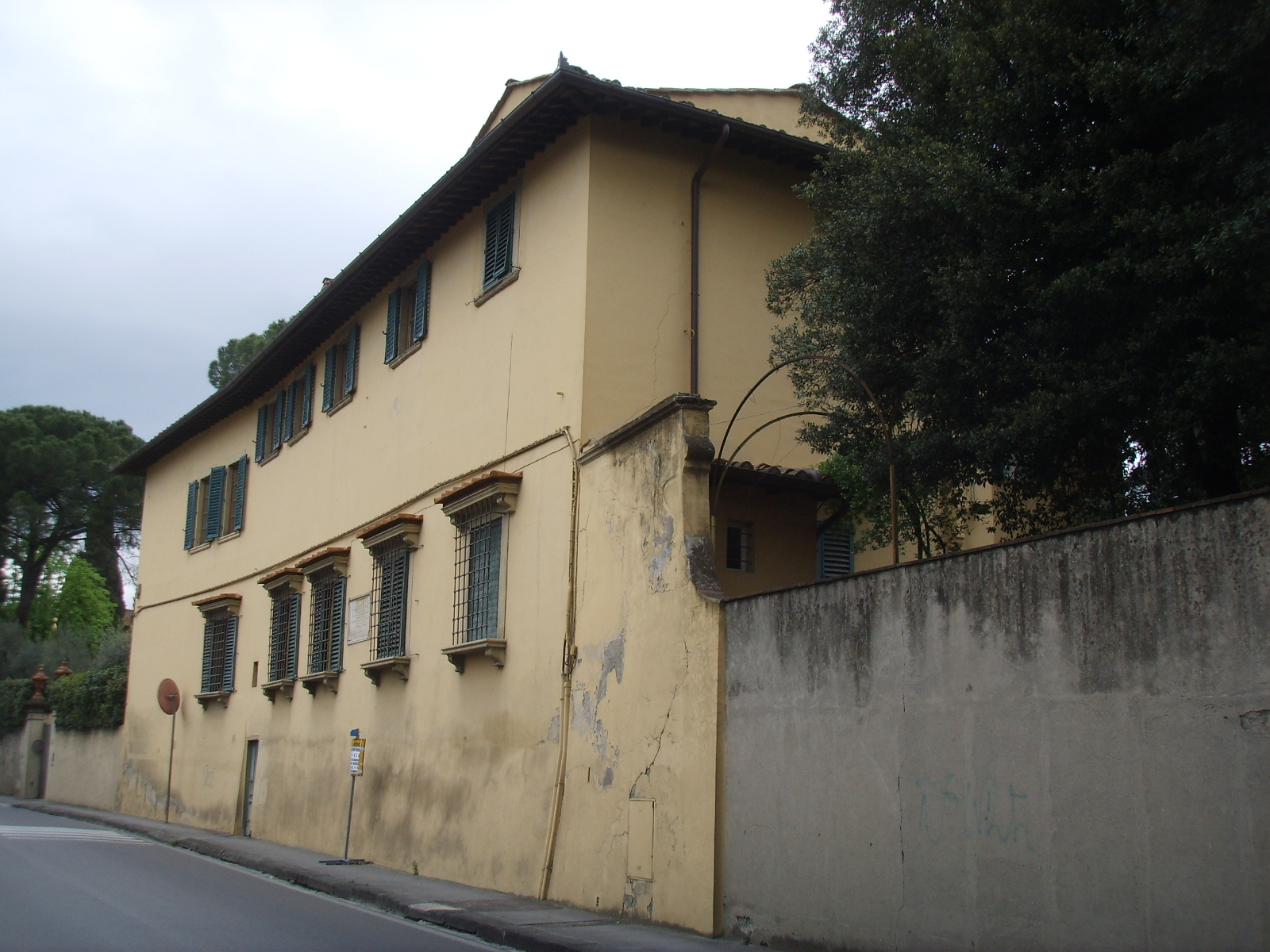 Villa colletta